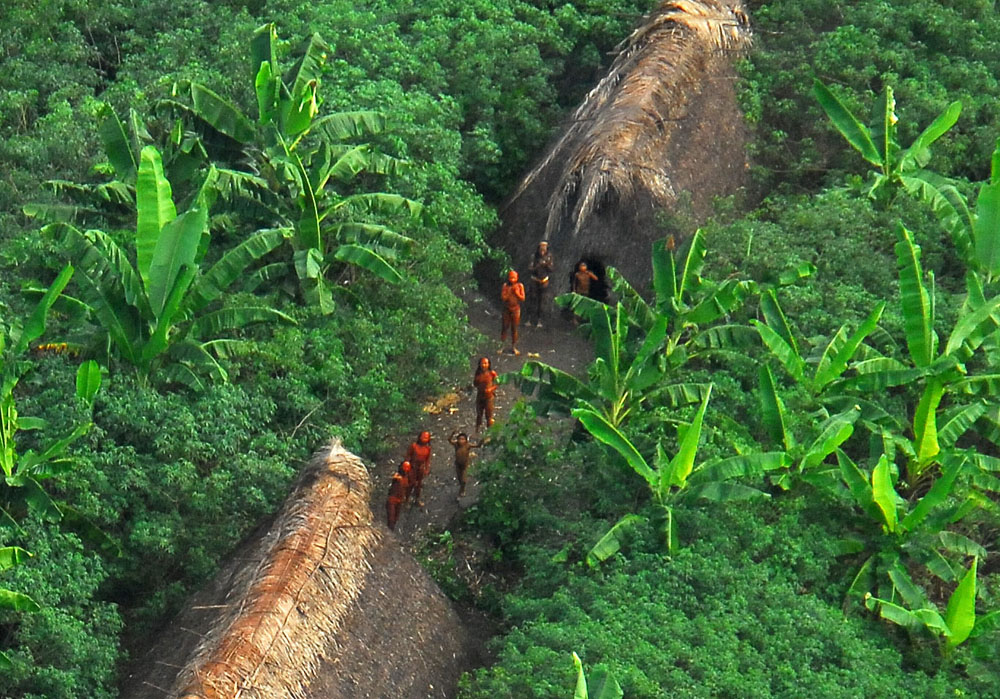 Índios isolados em aldeia localizada no estado brasileiro do Acre.